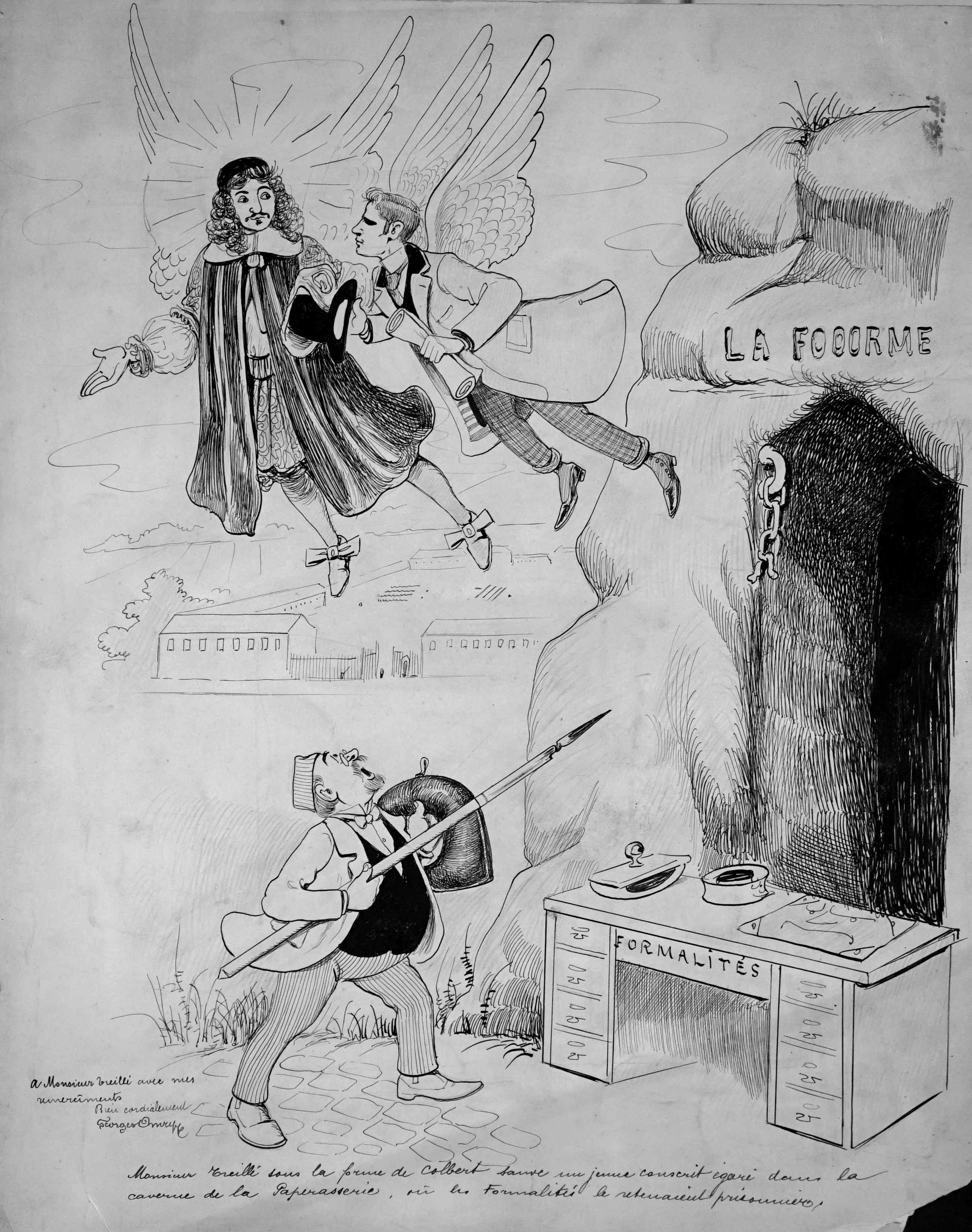 lors de l'expostion sur Georges Omry, Fantaisies à la Belle époque